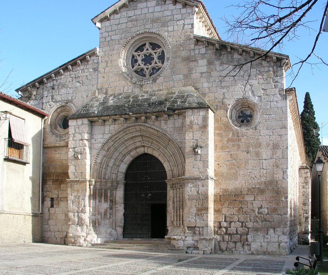 Brihuega, Iglesia de San Felipe, Provincia de Guadalajara, Spain